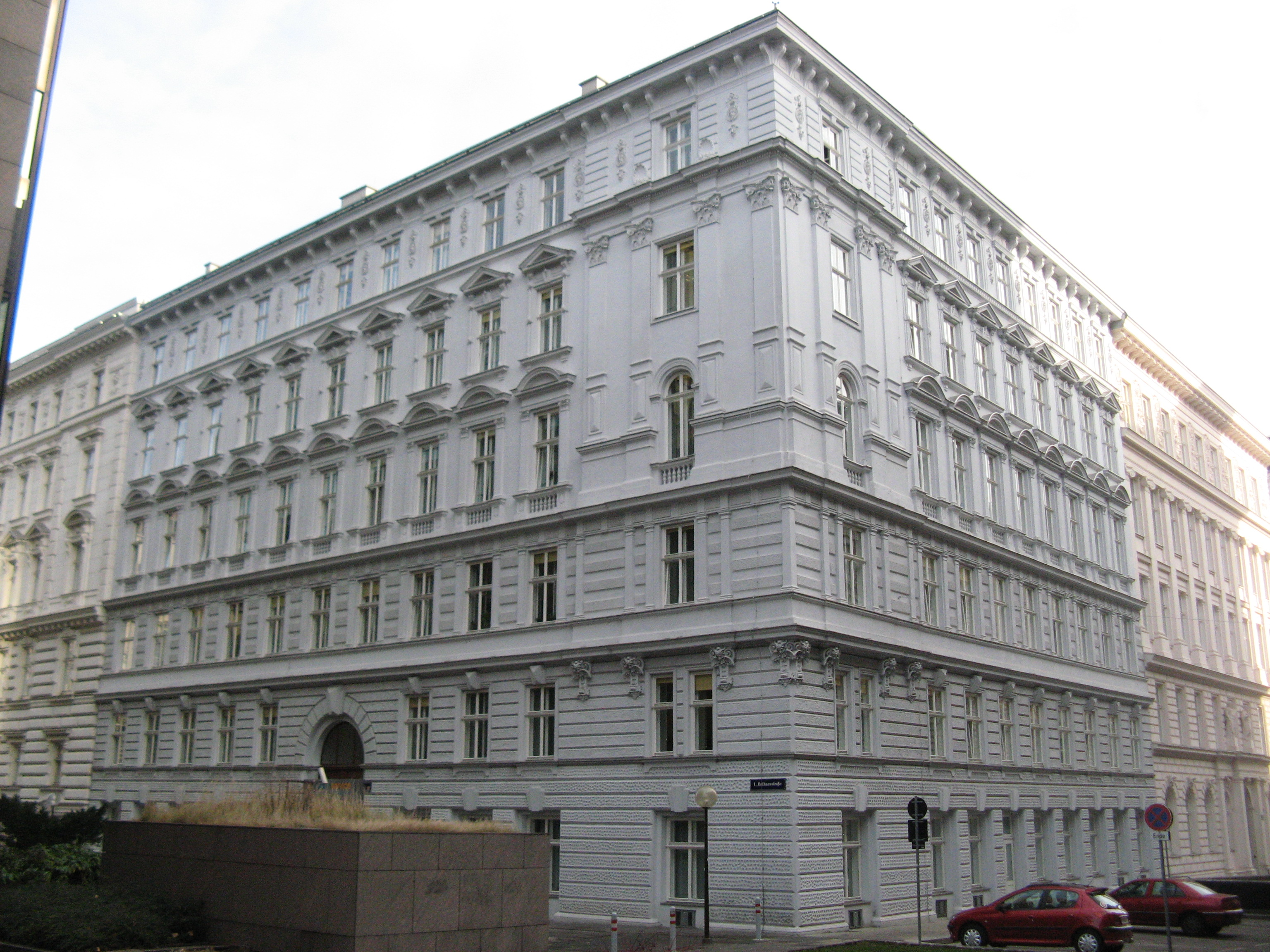 Haus Rathausstraße 2 (1887-88) von Ludwig Zatzka, Wien-Innere Stadt